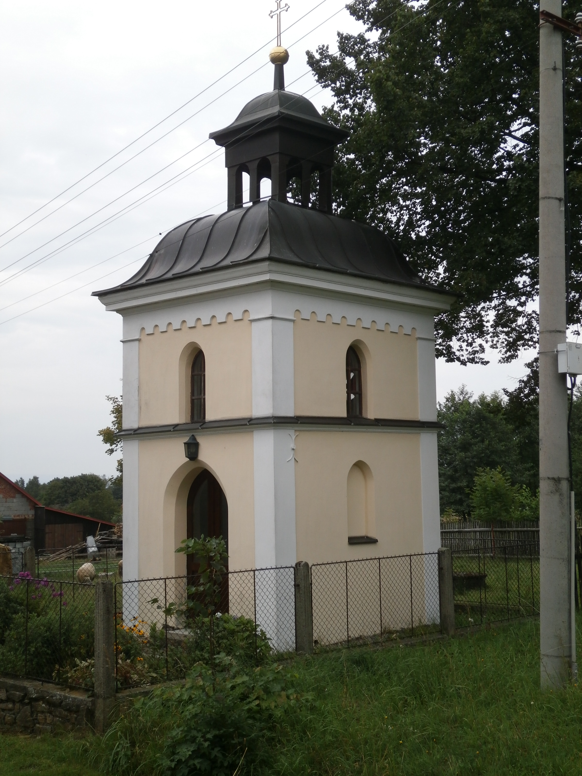 Paseky - kaplička